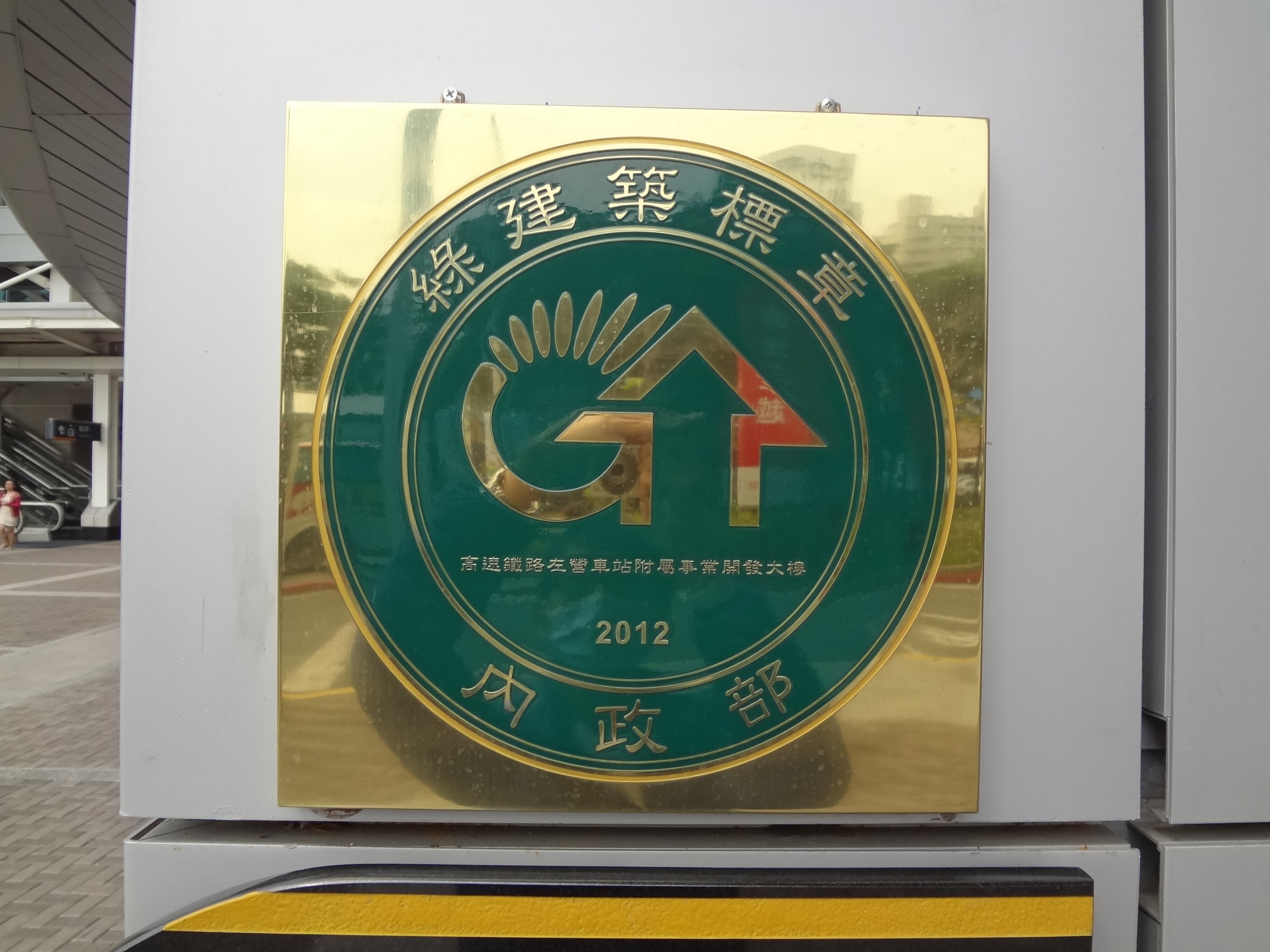 高速鐵路左營車站附屬事業開發大樓外牆釘掛的2012年中華民國內政部綠建築標章。